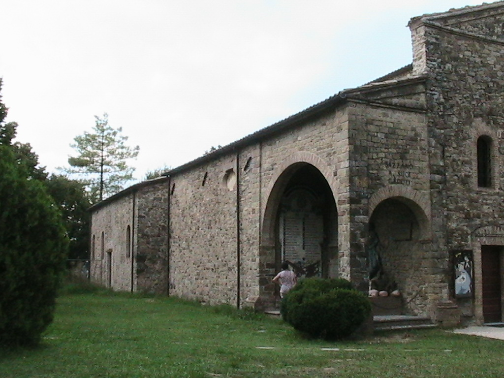 Bazzano (Neviano degli Arduini) - Pieve romanica di Sant'Ambrogio